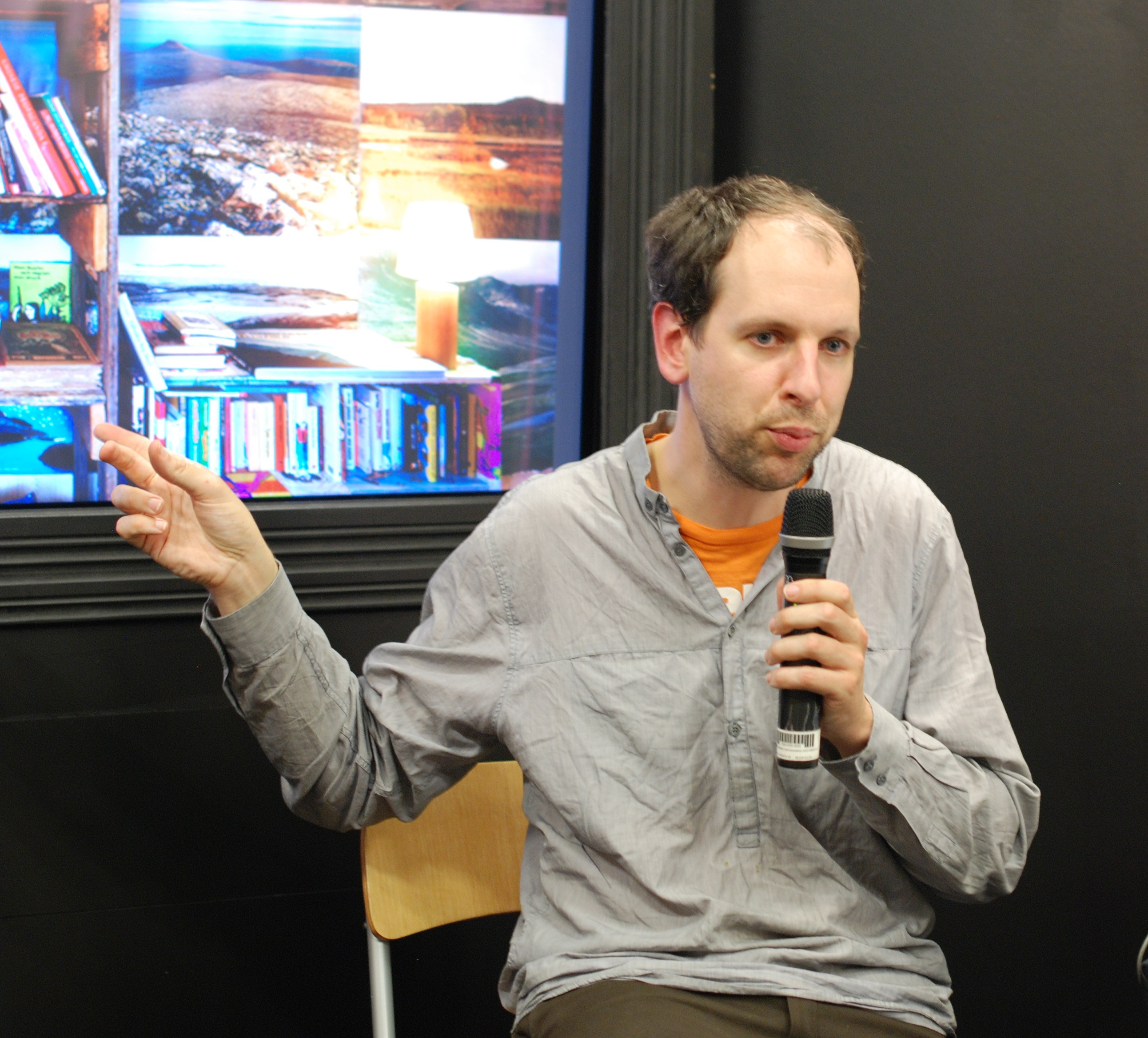 Photograher Hendrik Zeitler at the Göteborg Book Fair 2010